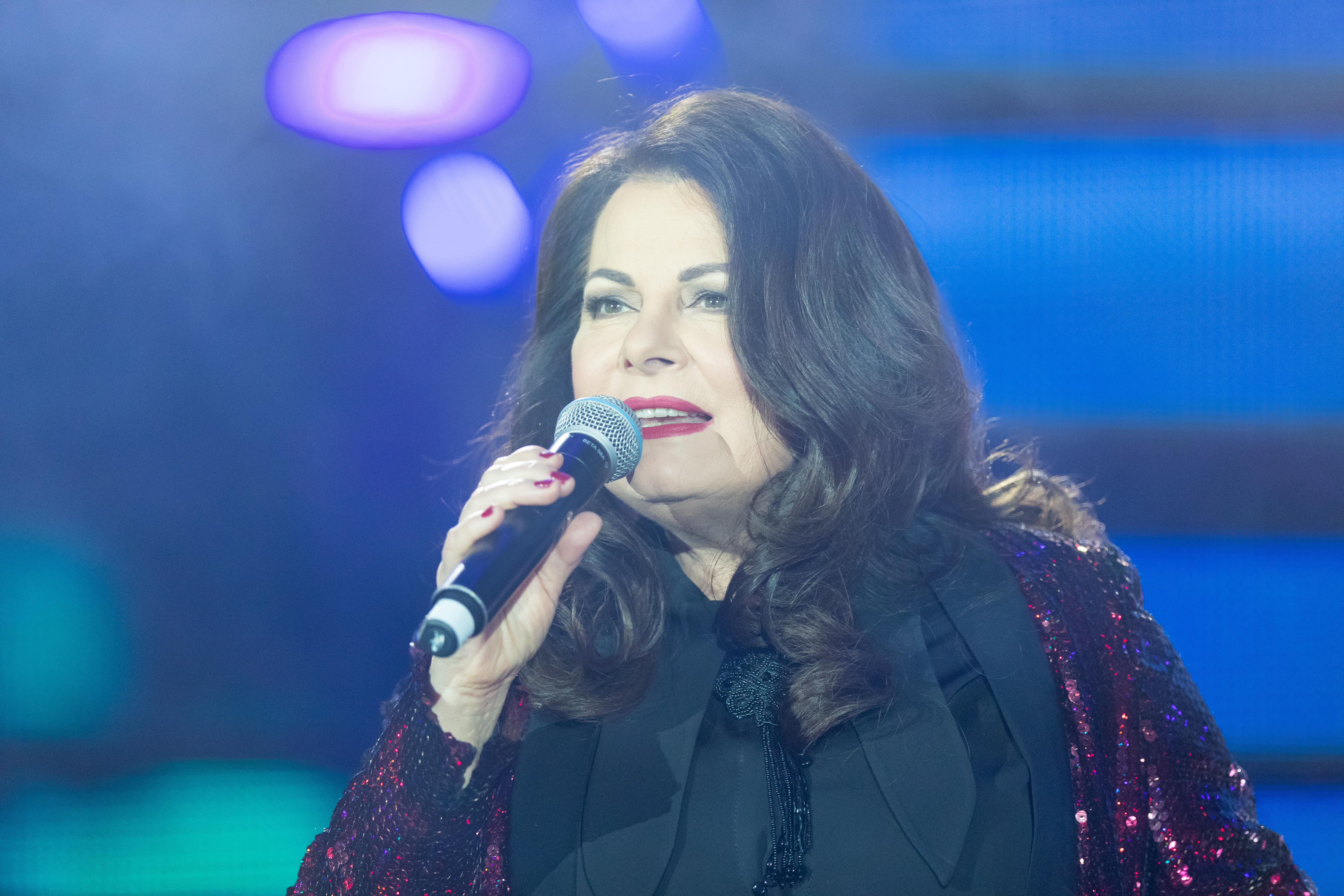 Marianne Rosenberg during Die Schlagernacht des Jahres at Hanns-Martin-Schleyer-Halle, Stuttgart, Baden-Württemberg, Germany on 2018-10-13, Photo